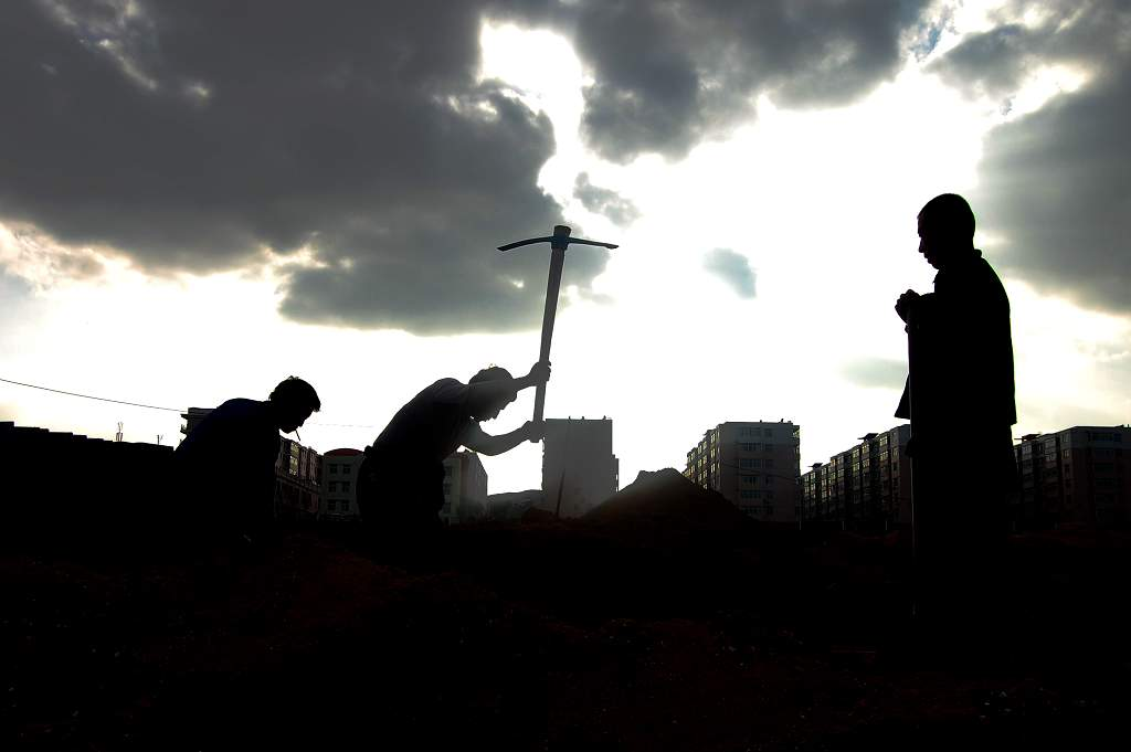 城市的缔造者